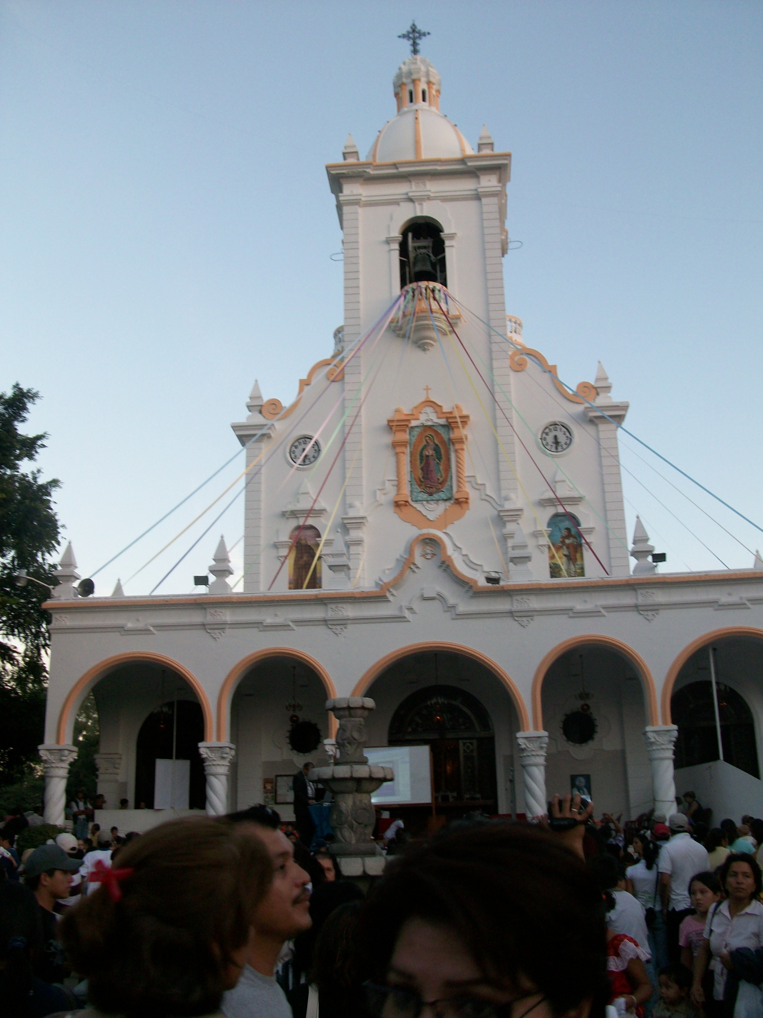 Basilica Nuestra Señora de Guadalupe, Municipio Antiguo Cuscatlan, Departamento de la Libertad, El Salvador